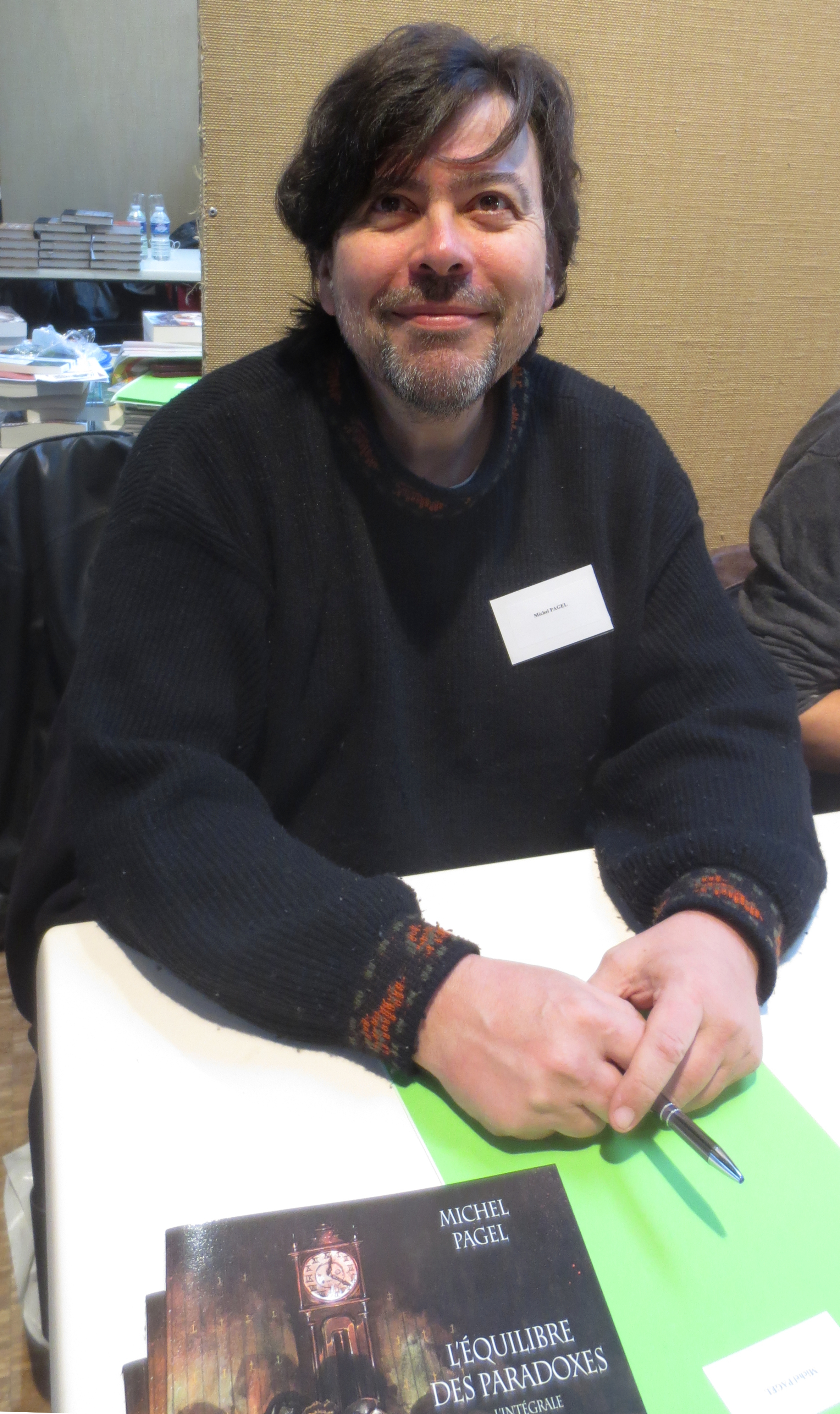 Michel Pagel en dédicace lors des 13èmes Rencontres de l'imaginaire de Sèvres, le samedi 26 novembre 2016